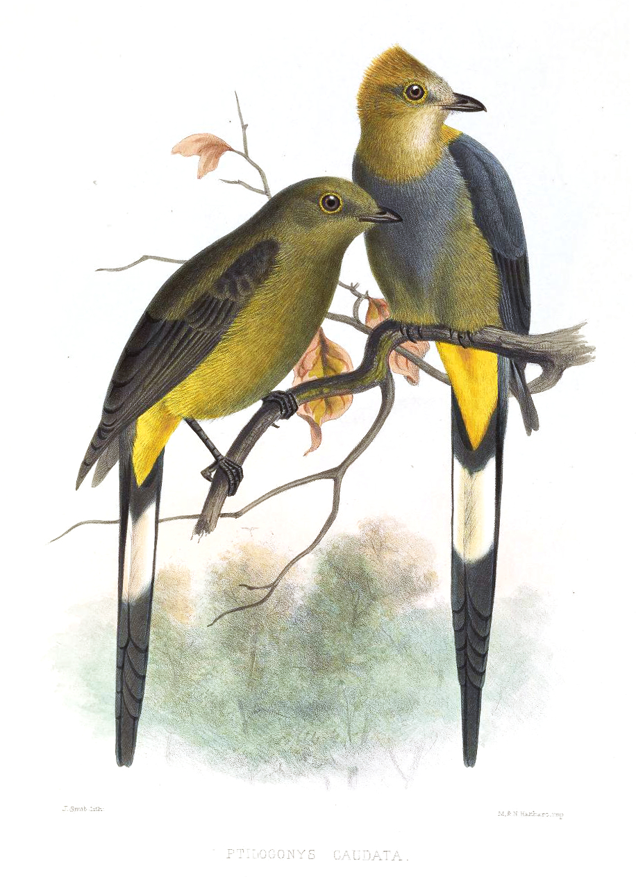 Ptilogonys caudatus